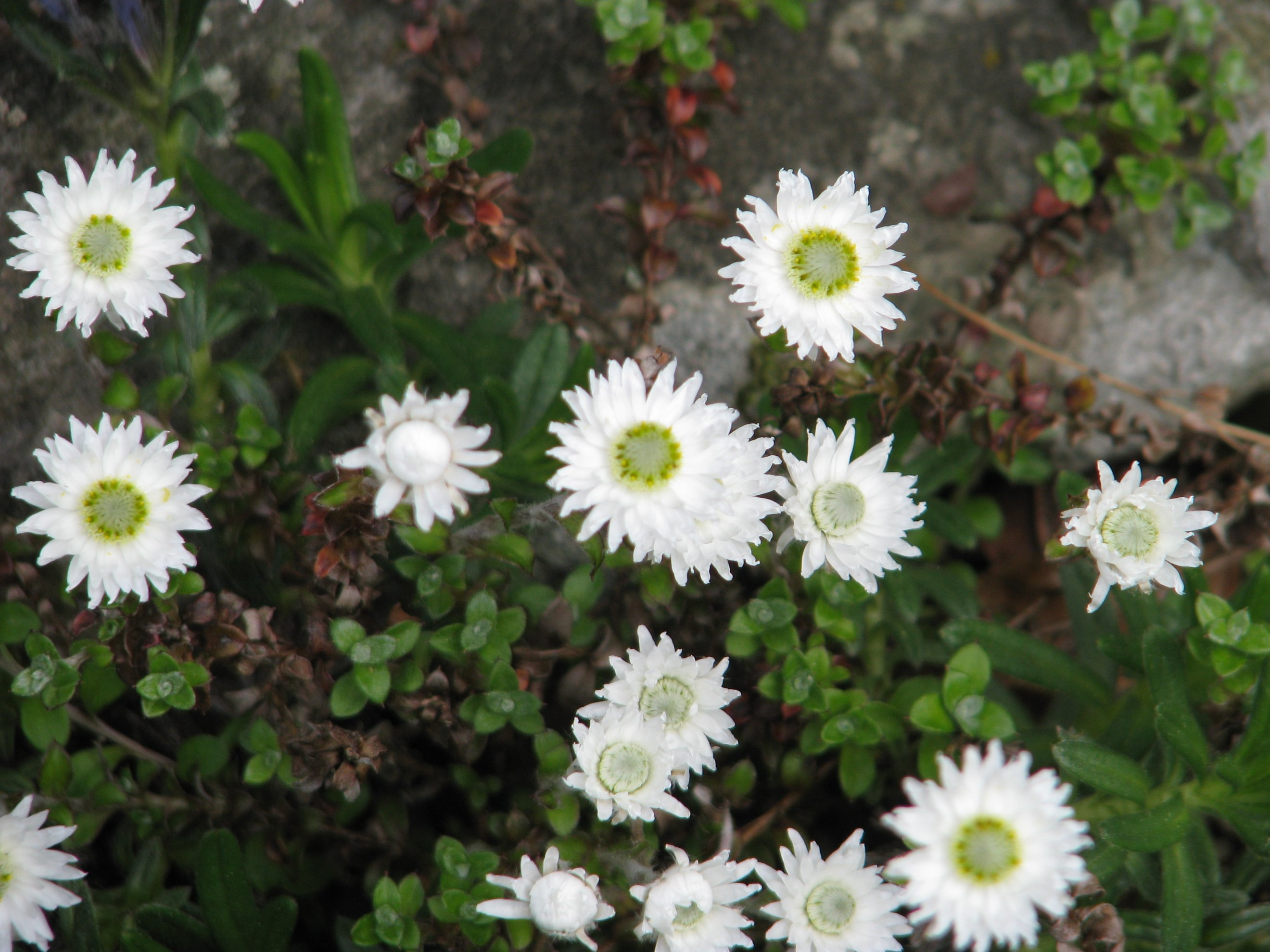 Anaphalioides bellidioides